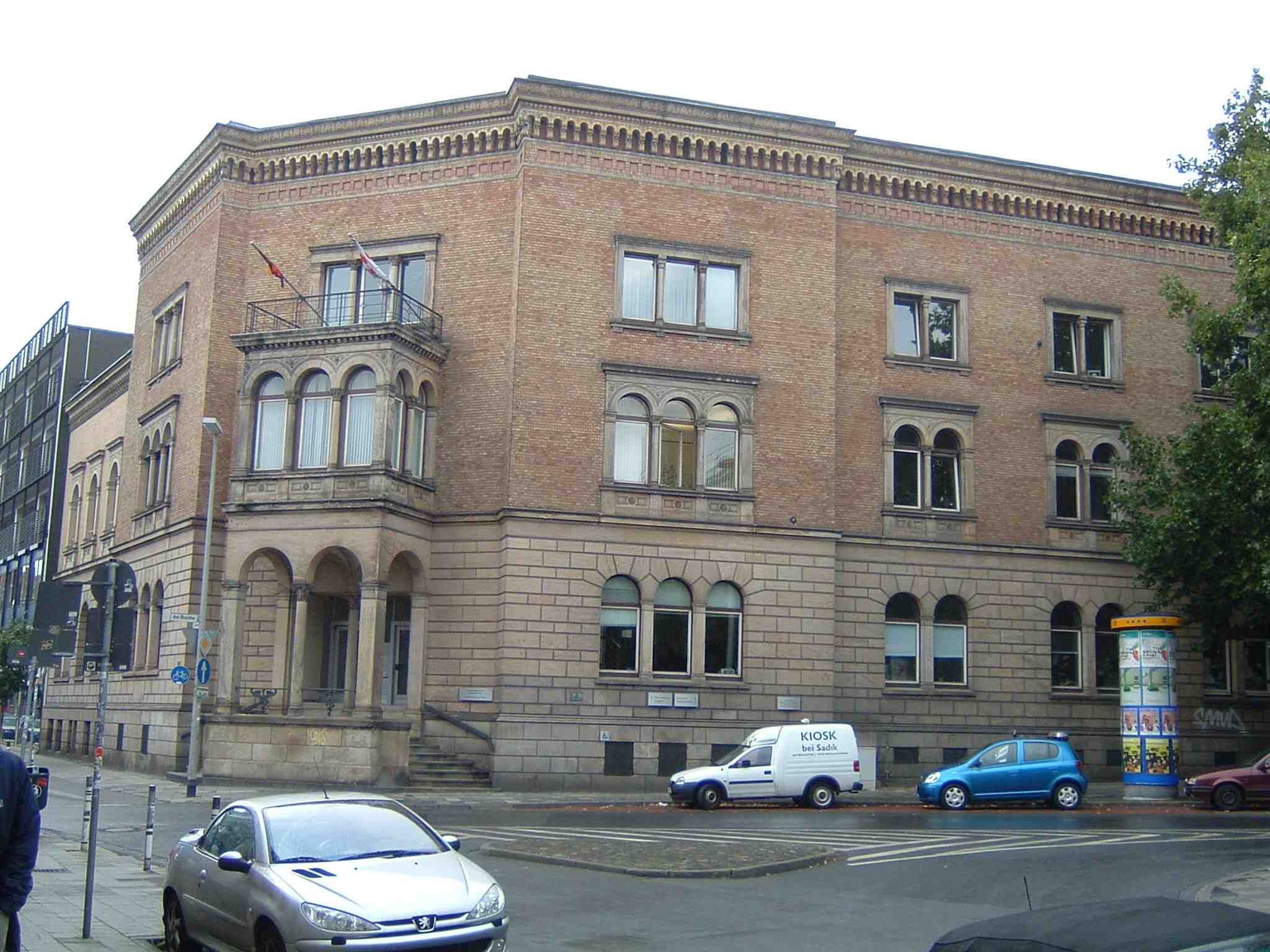 Oberlandesgericht Braunschweig